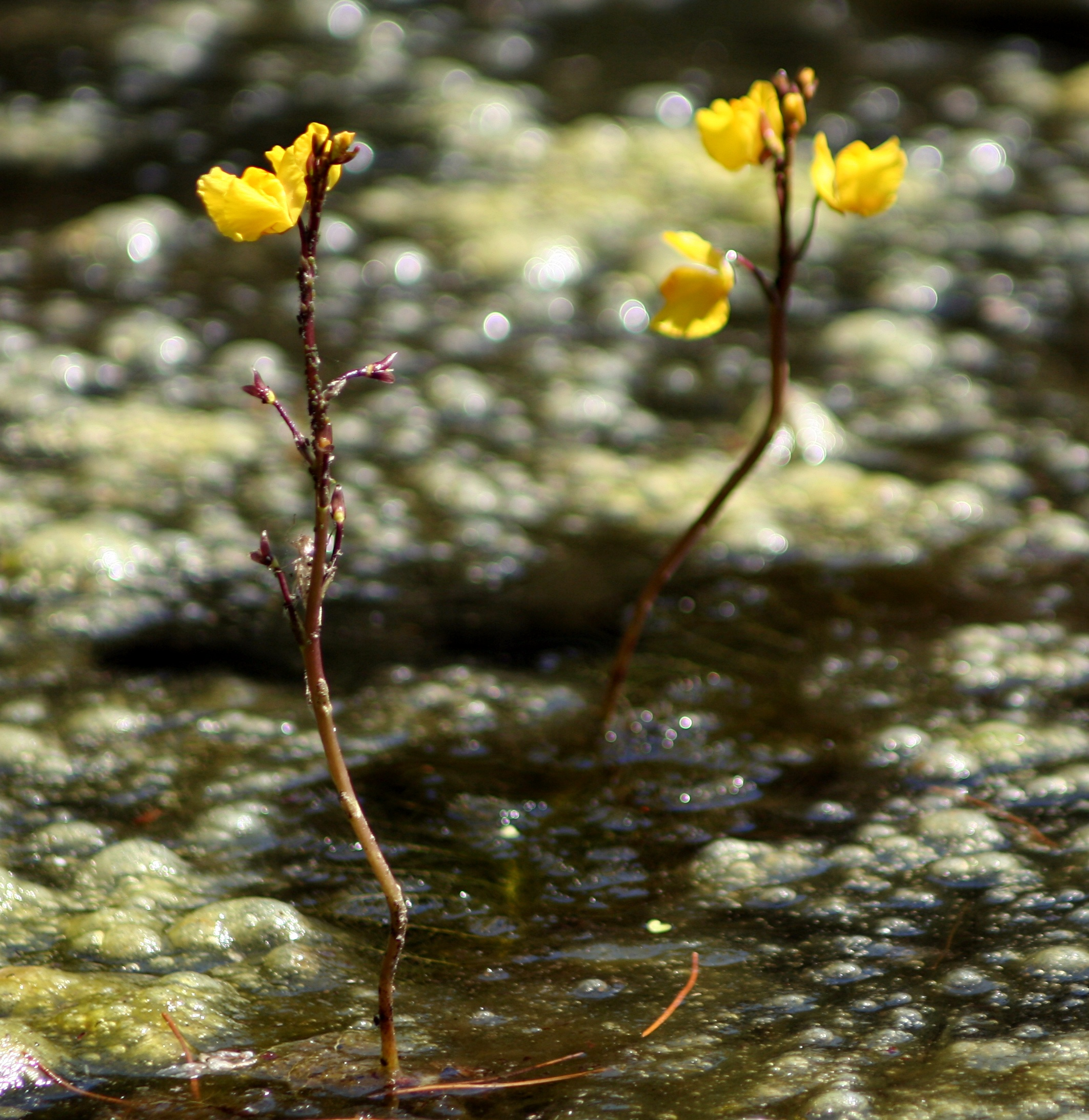 Park Narodowy Bory Tucholskie, kwiaty pływacza zwyczajnego